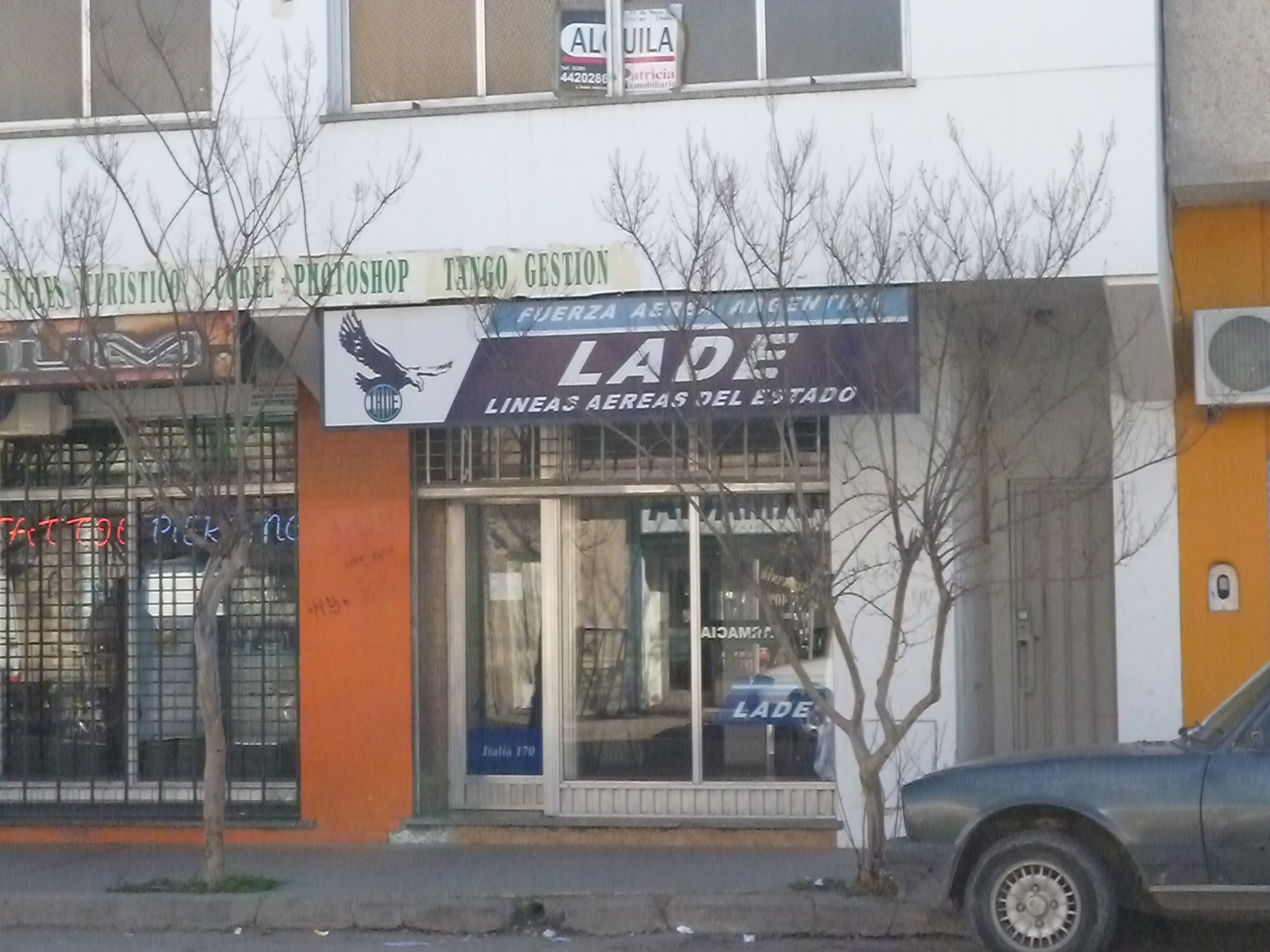 Oficinas LADE en Trelew. Mejor versión